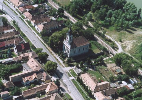 Dunaalmás, Hungary, aerialphotography